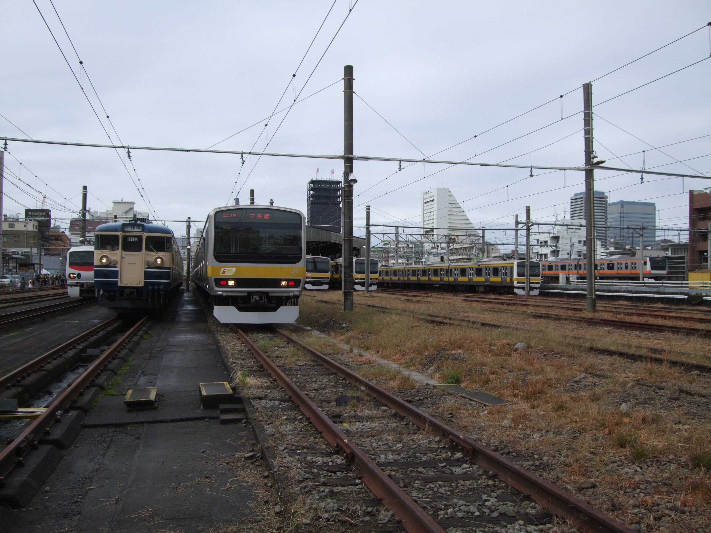 中野電車区構内